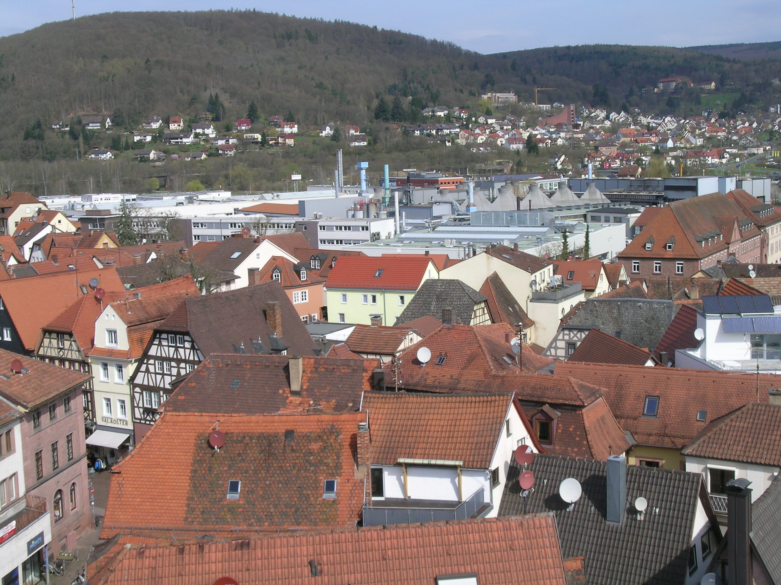 Werk Bosch Rexroth in Lohr am Main